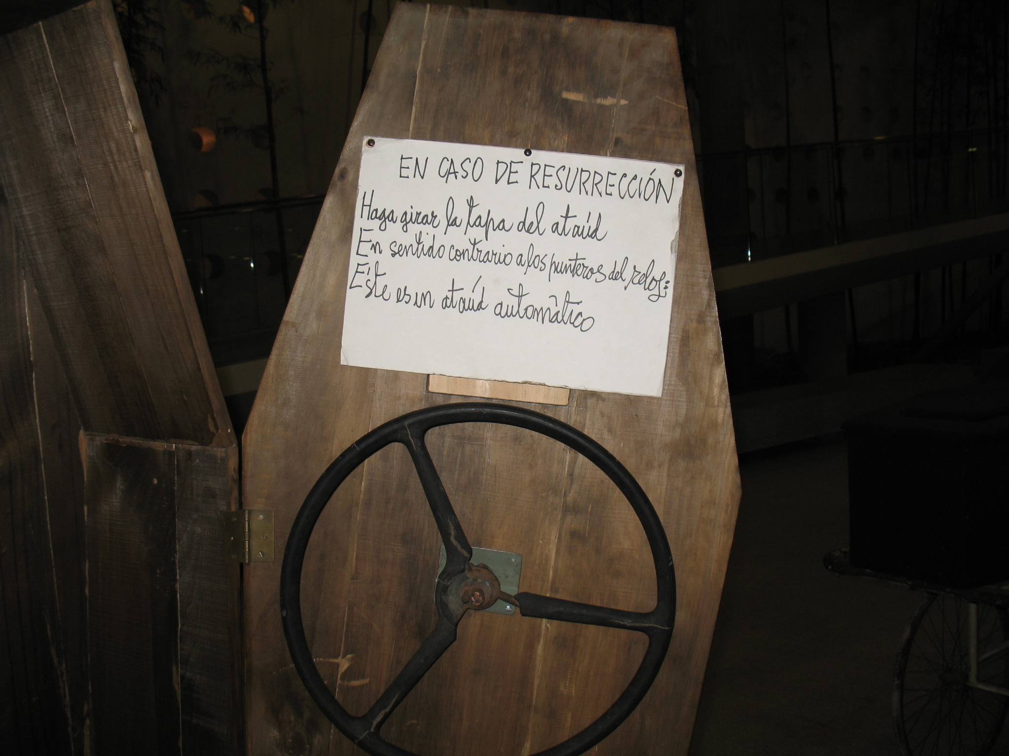 Instalación de Nicanor Parra en el Centro Cultural Palacio La Moneda, santiago, en 2007.